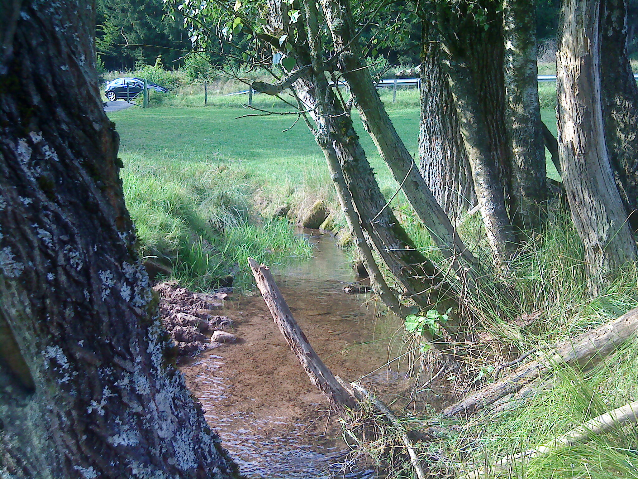 Der Wohnroder Bach, kurz vor dem Zusammenfluss zur Fella zwischen Fellen und Wohnrod